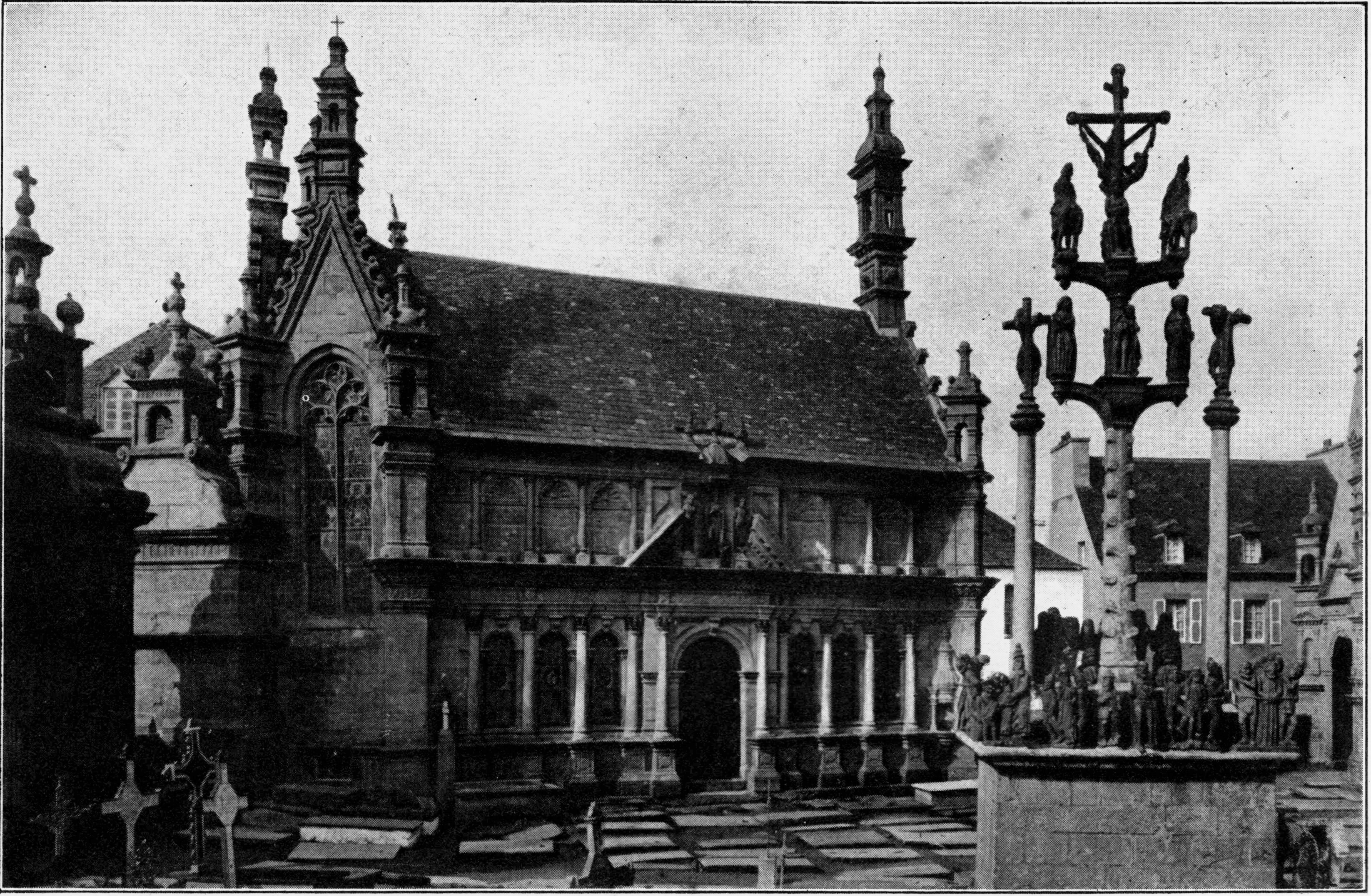 Illustration du livre : Saint-Thégonnec. L’Église et ses annexes de l'Abbé François Quiniou (1870 – 1931) après la page 32